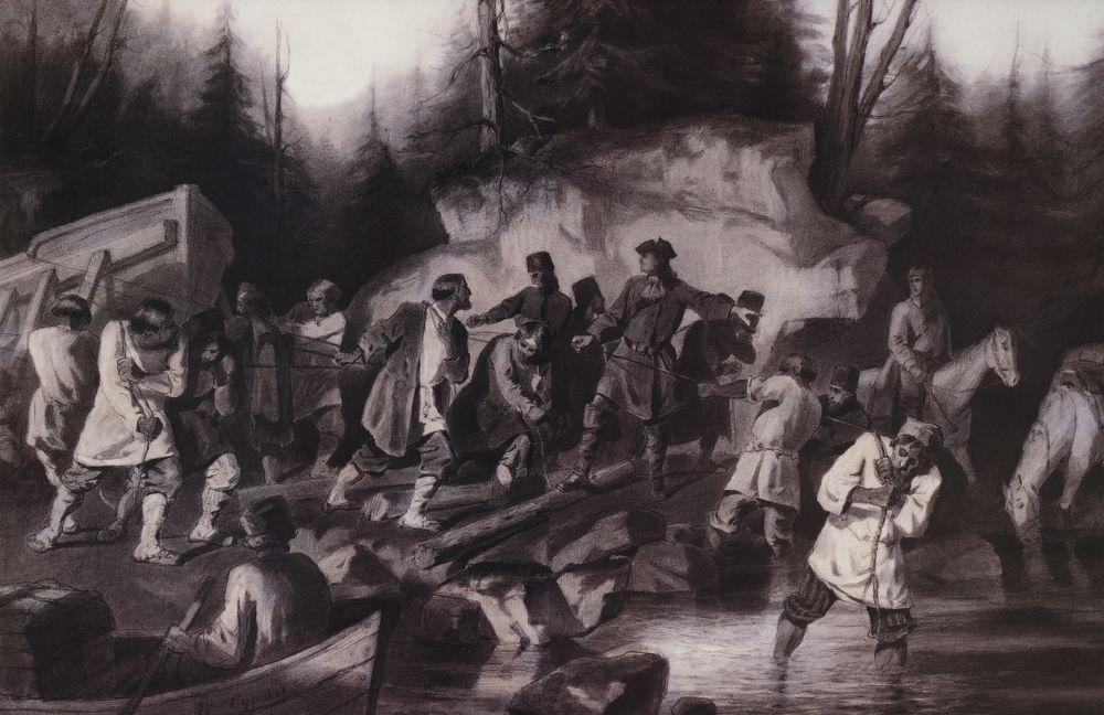 Петр Великий перетаскивает суда из Онежского залива в Онежское озеро для завоевания крепости Нотебург у шведов. Бумага, уголь, граф, карандаш.